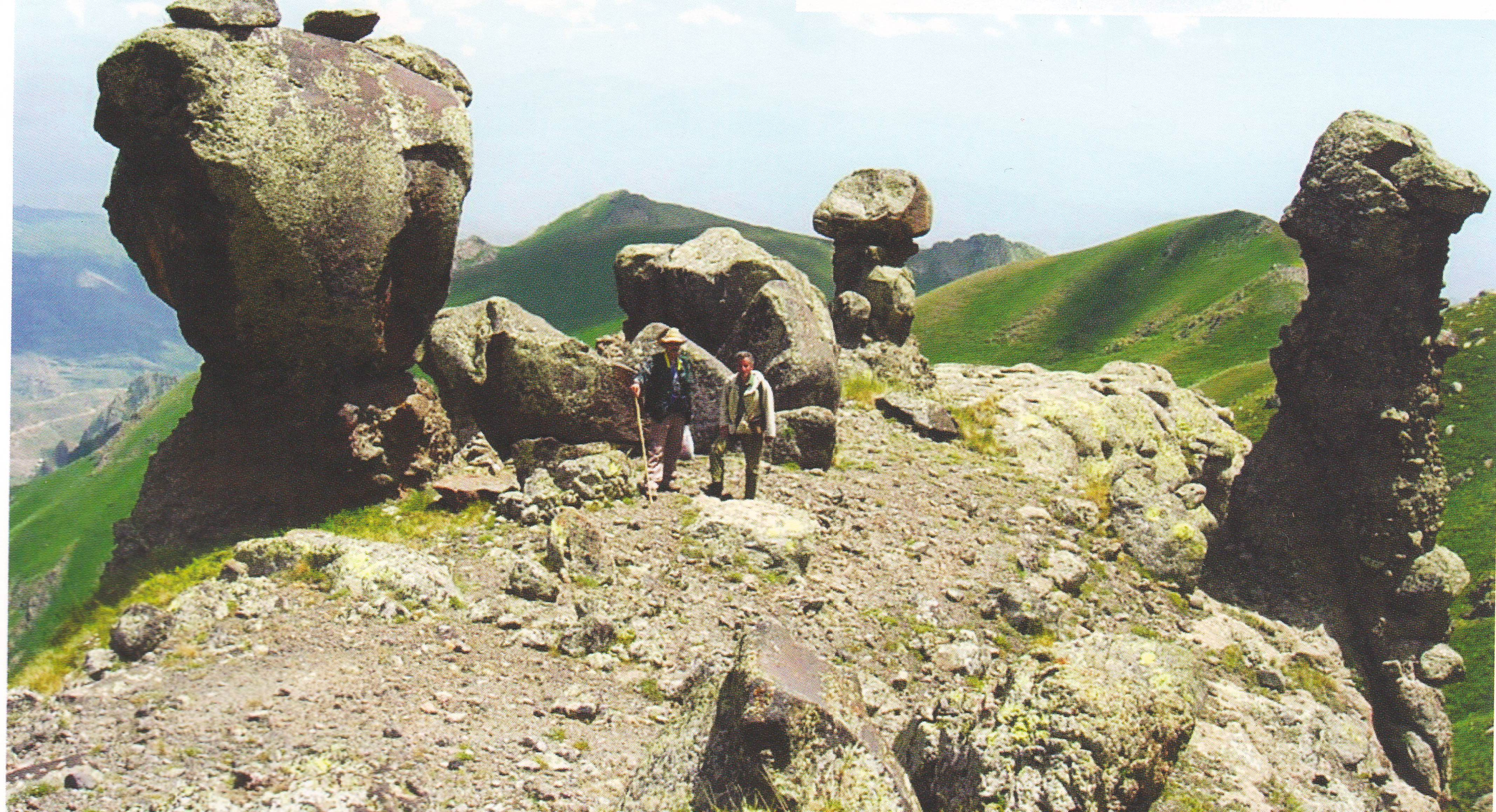 Küküdağ (Şahbuz rayonu)